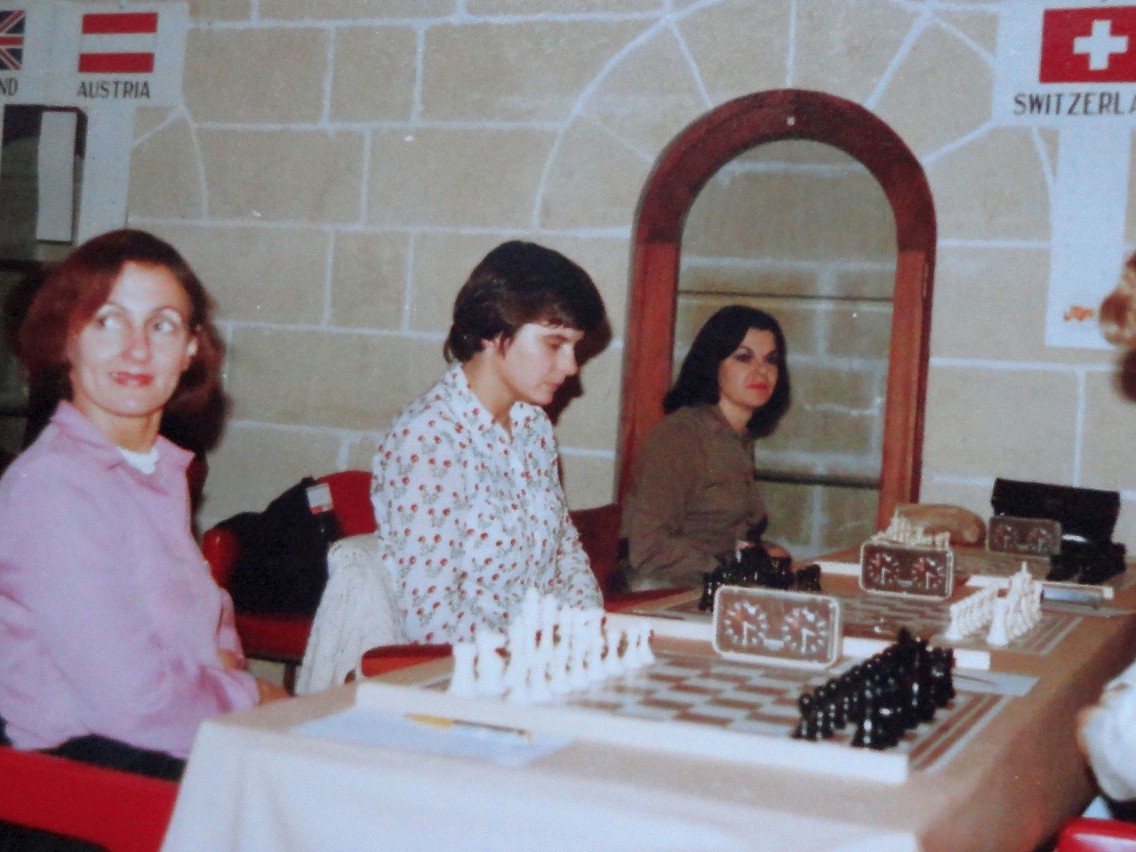 Vanda Veprek, Christa Bürgin und Silvia Schladetzky, das Schweizer Team bei der Schacholympiade 1980 in Valletta auf Malta.